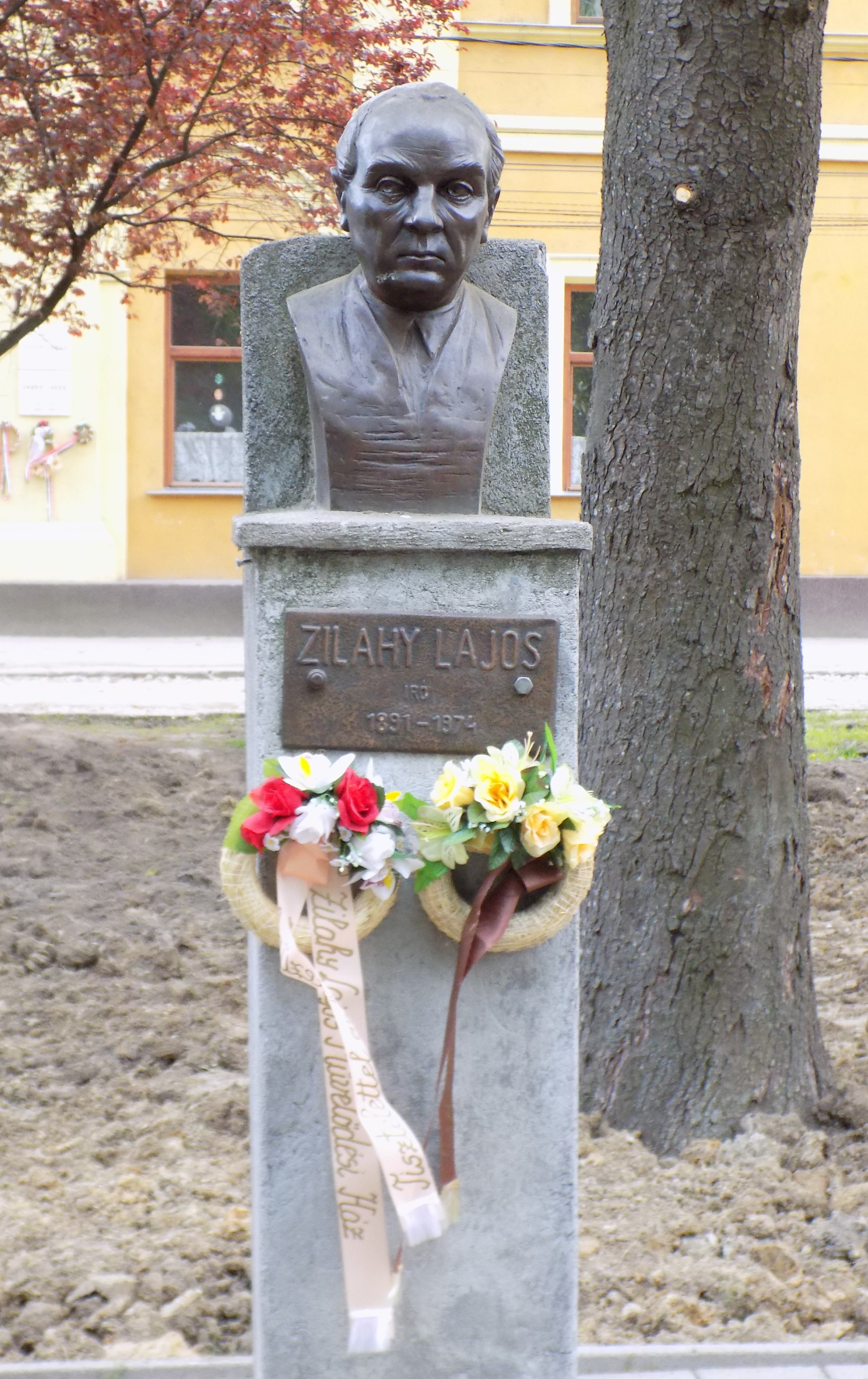 Lajos Zihaly Büste